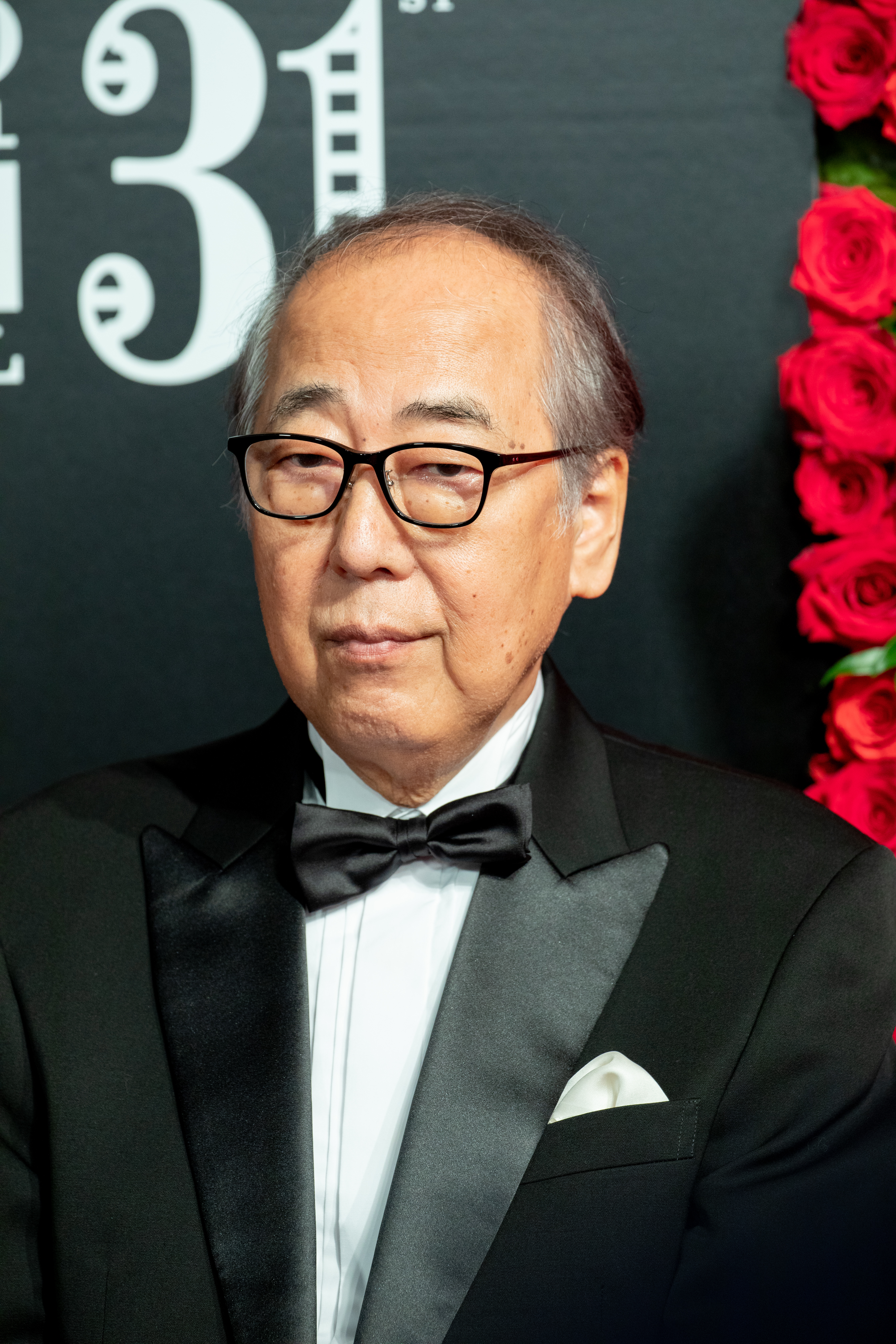 第30回 東京国際映画祭 オープニングセレモニー 岸部一徳 (鈴木家の嘘)